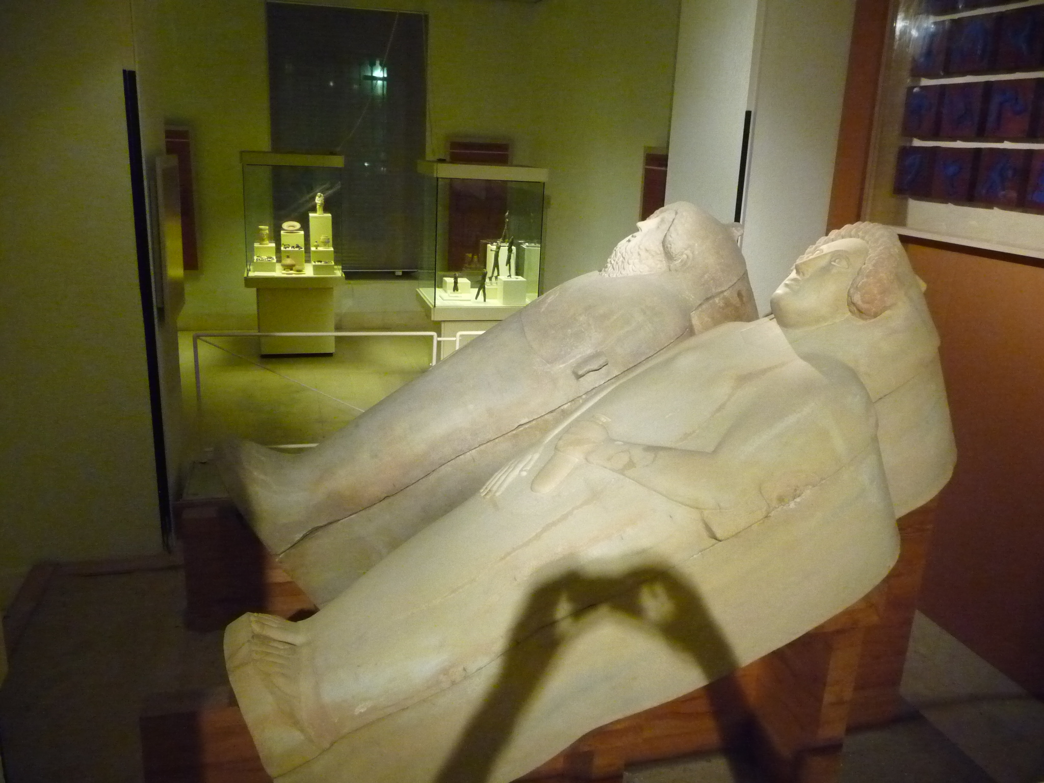 MuseoArqueologicoCadiz-P1050192.JPG